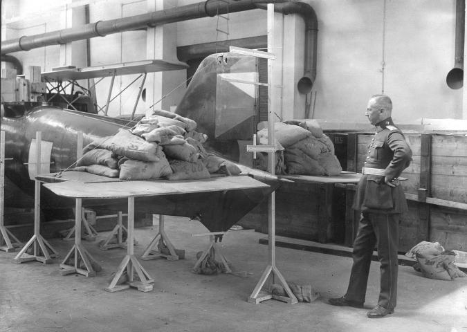 VZLU ZKOUSKY PEVNOSTI